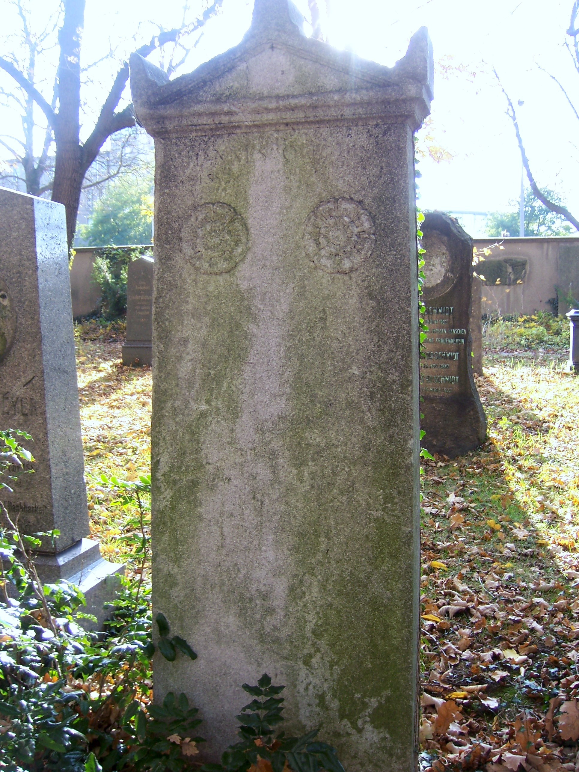 Grabstein Johannes Overbeck, ursprünglich: Neuer Johannisfriedhof